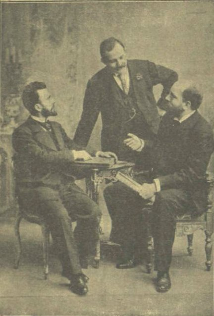 Beer József szövegíró, Kéméndy Jenő díszlettervező és Mader Raul zeneszerző a "She" című balett szerzői. Vasárnapi Ujság, 1898-2-13.